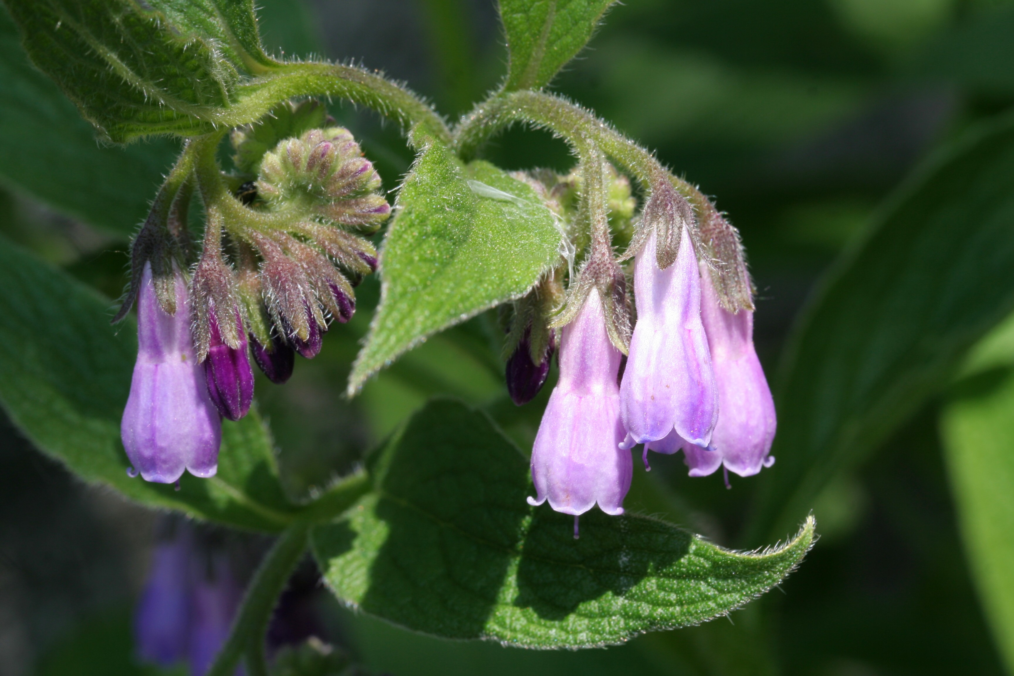 Symphytum_officinale (Consolida maggiore) Località Pasa, Sedico (BL), 356 m s.l.m.